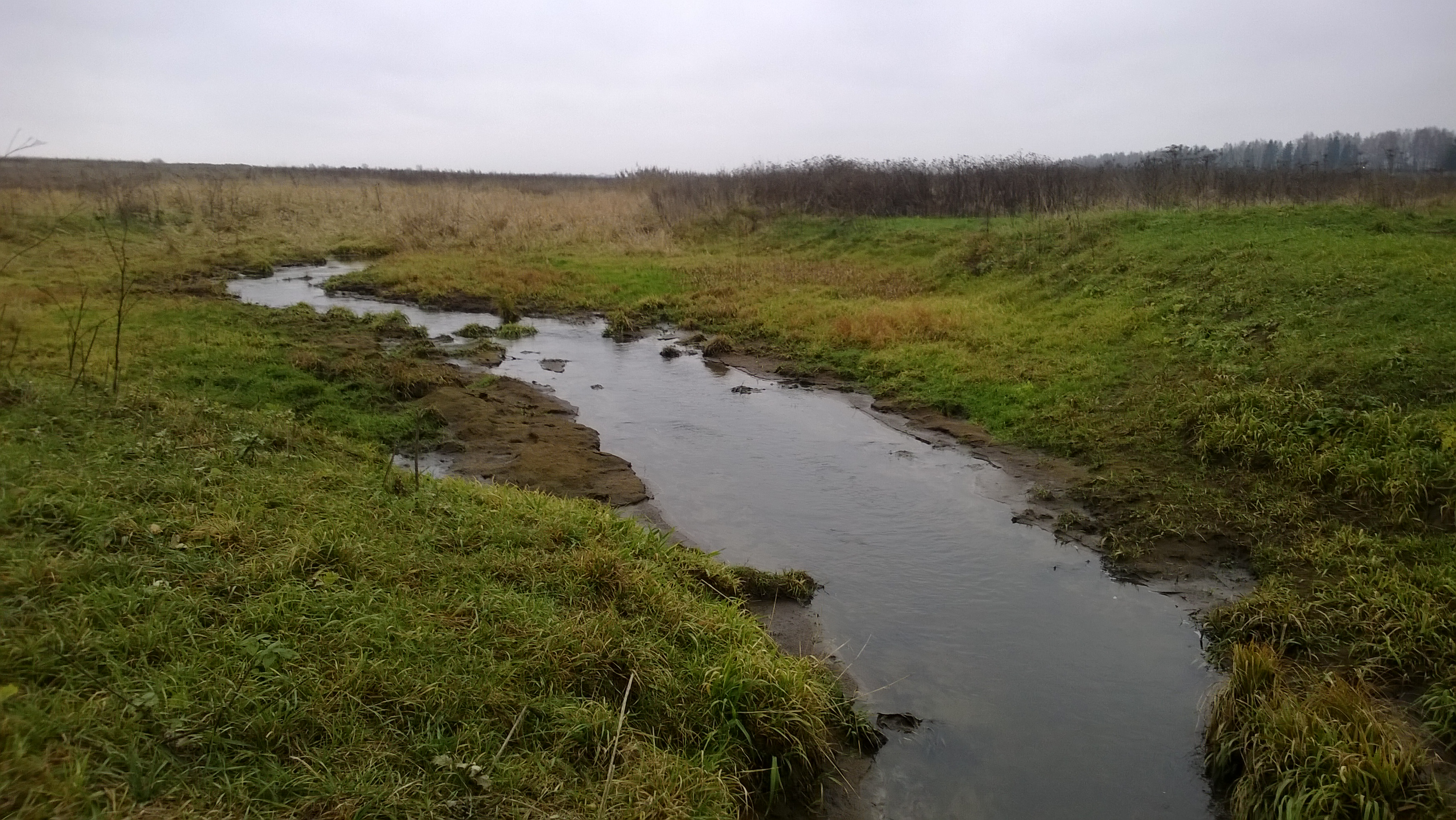 Река Сенная у деревни Шишково Волоколамского района Московской области